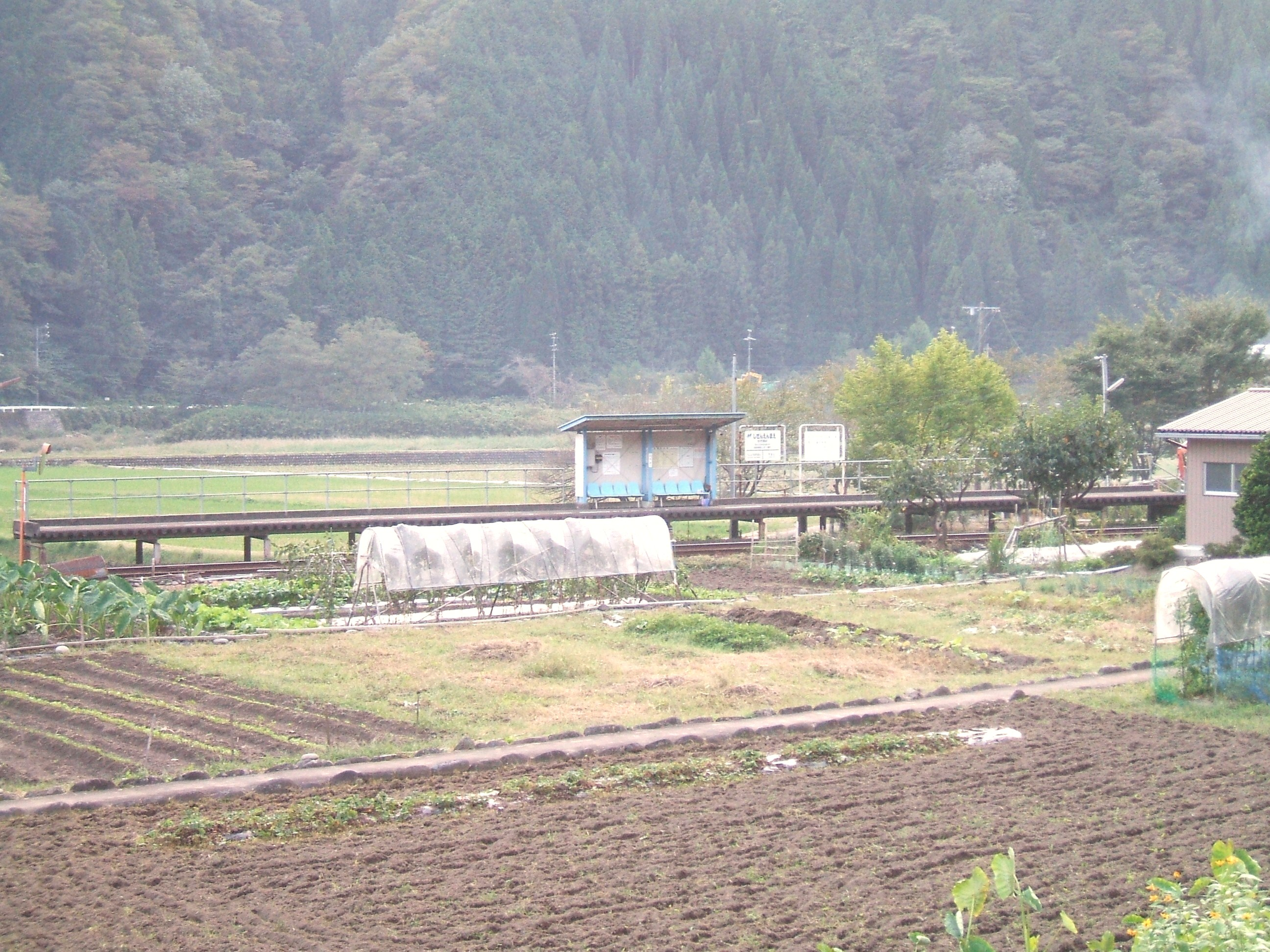 国道から見た自然園前駅。